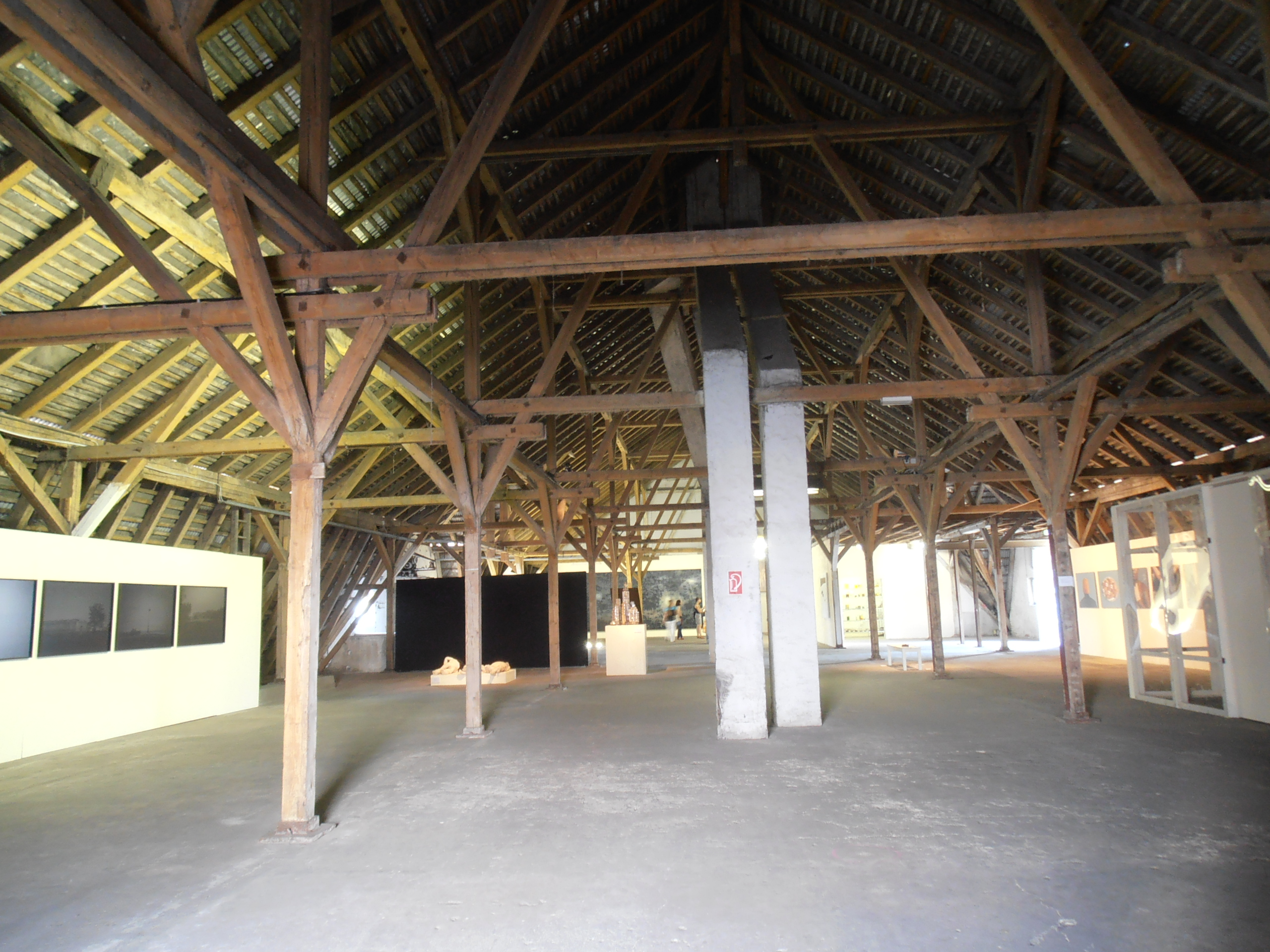 Ostrale 2013 Futterstall H1 West (Heuboden)